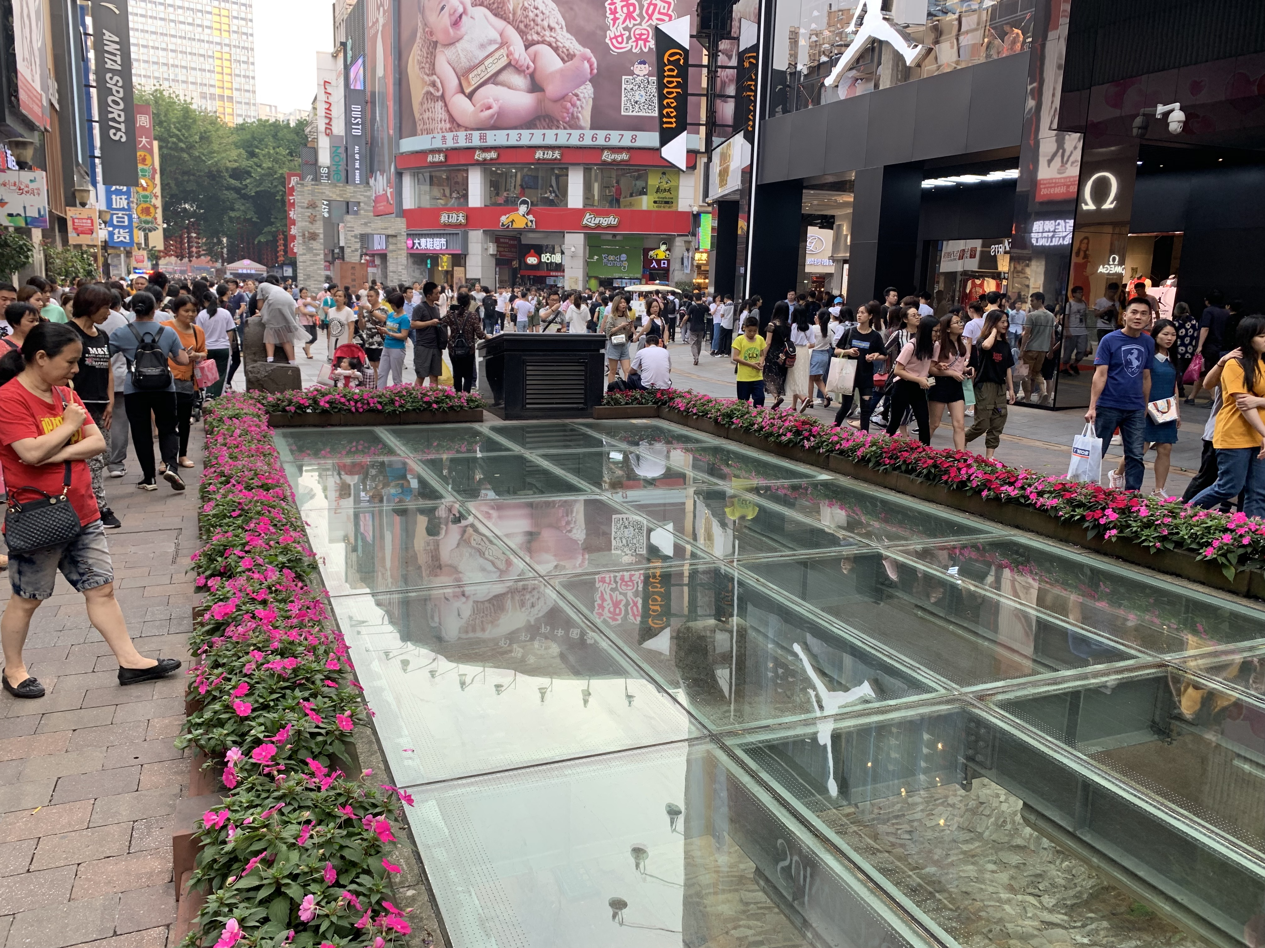 中文（中国大陆）: 北京路古道遗址，又名千年古道遗址。位于广东省广州市越秀区北京路商业步行街